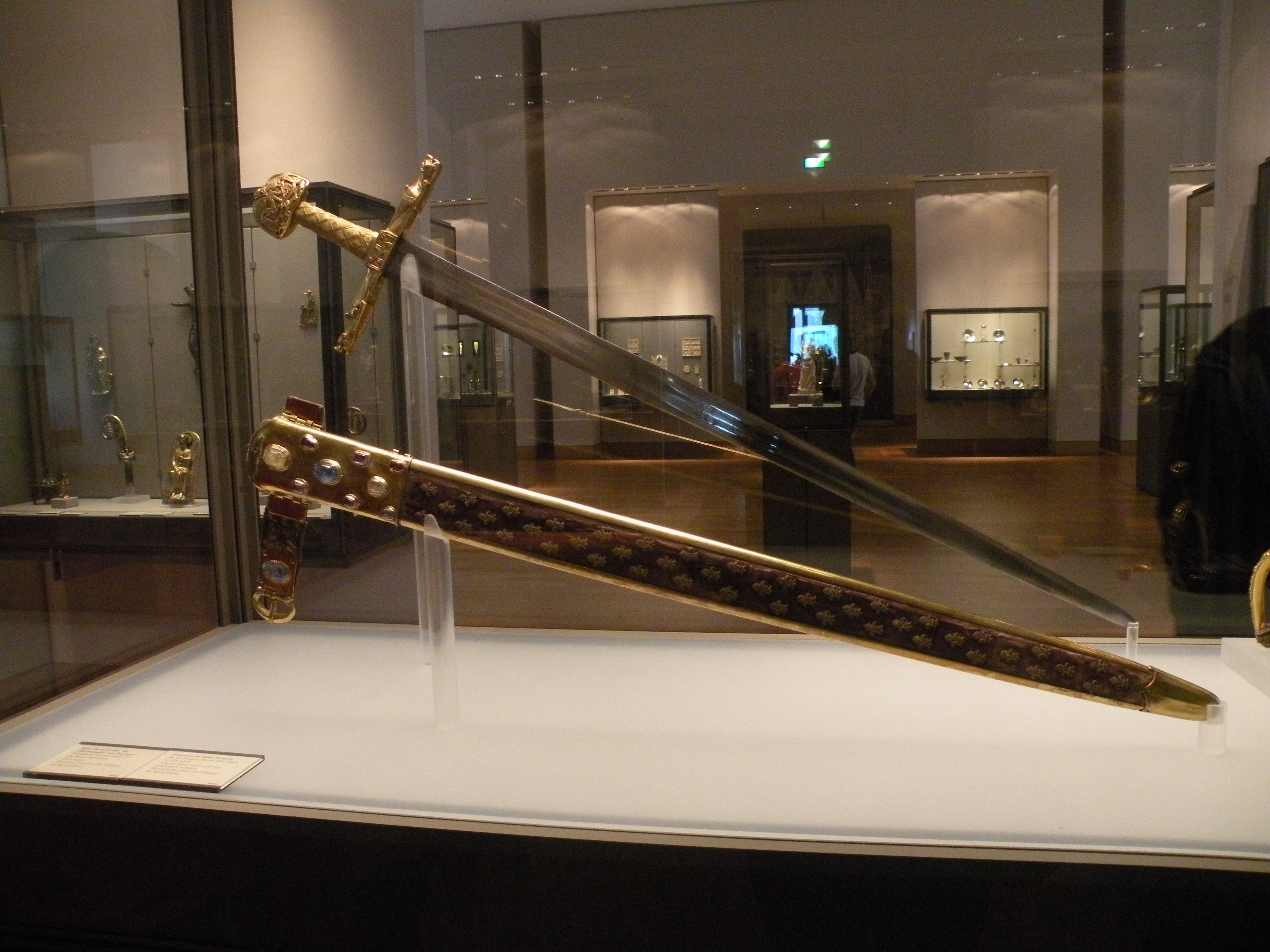 la joyeuse collection du louvre